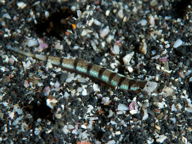 トビギンポ Limnichthys fasciatus